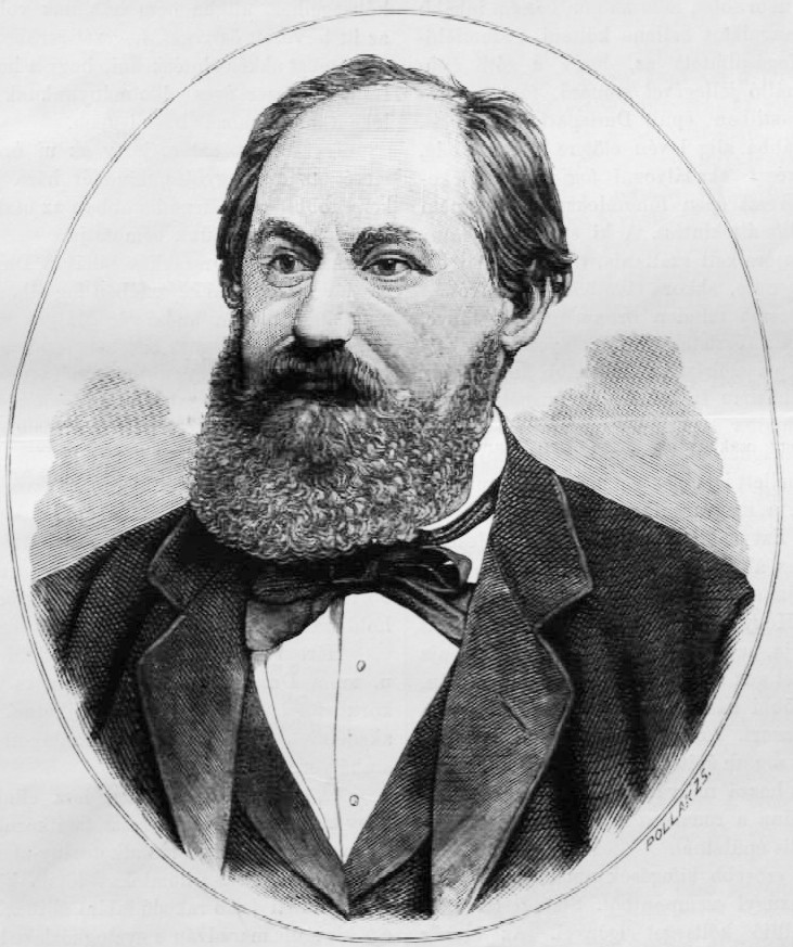 Steindl Imre (1839–1902) építész, egyetemi tanár, a Magyar Tudományos Akadémia levelező tagja. Pollák Zsigmond metszete